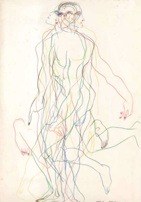 Fotografia de um desenho de Álvaro Leite Siza Vieira